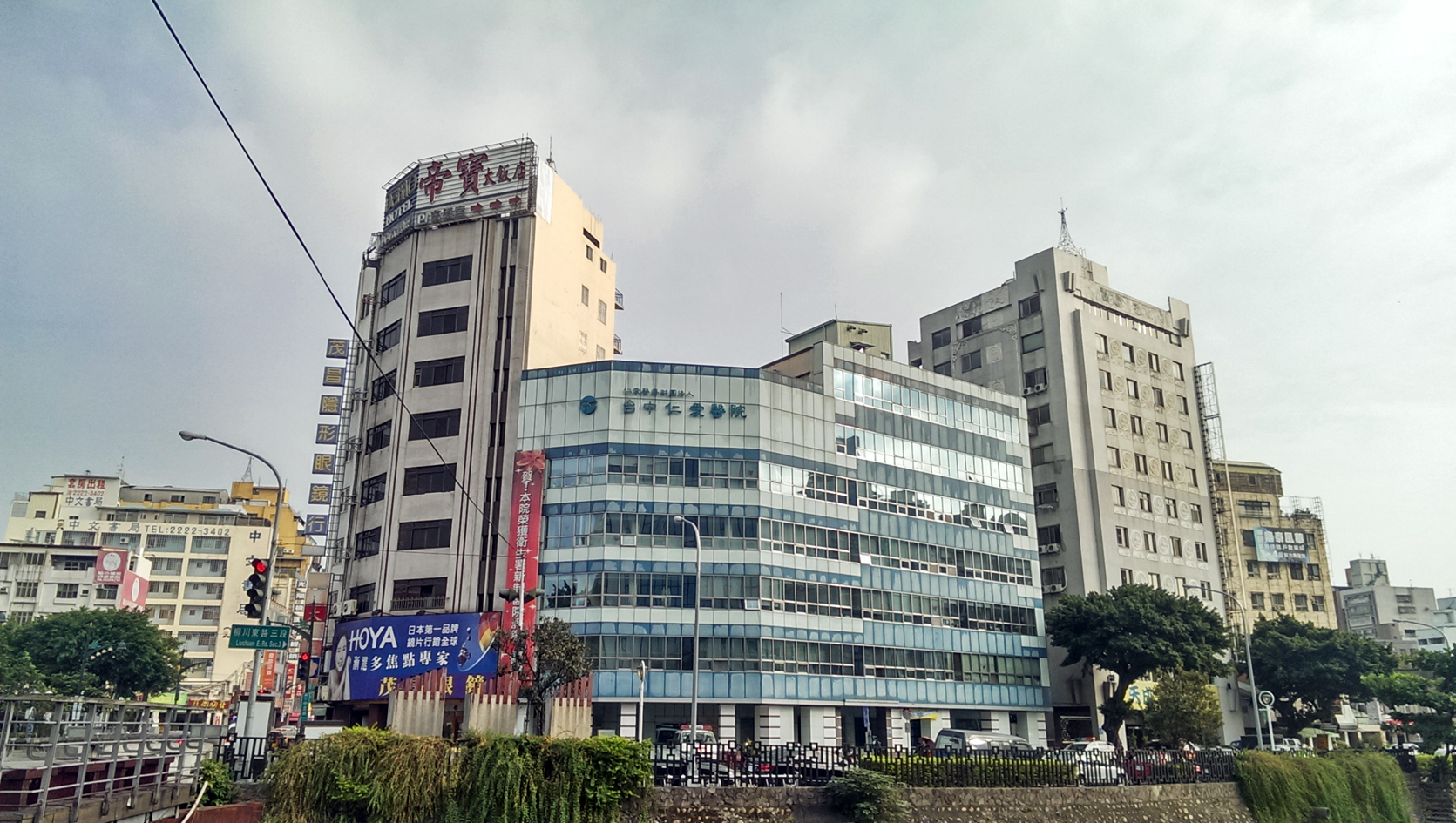 中文（台灣）: 台中仁愛醫院與柳川